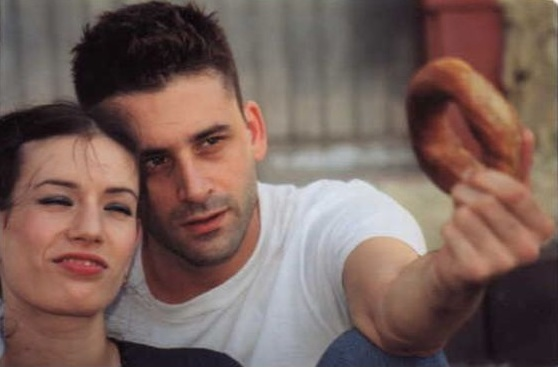 סרטו של אילן הייטנר "חוכמת הבייגלה", 2002